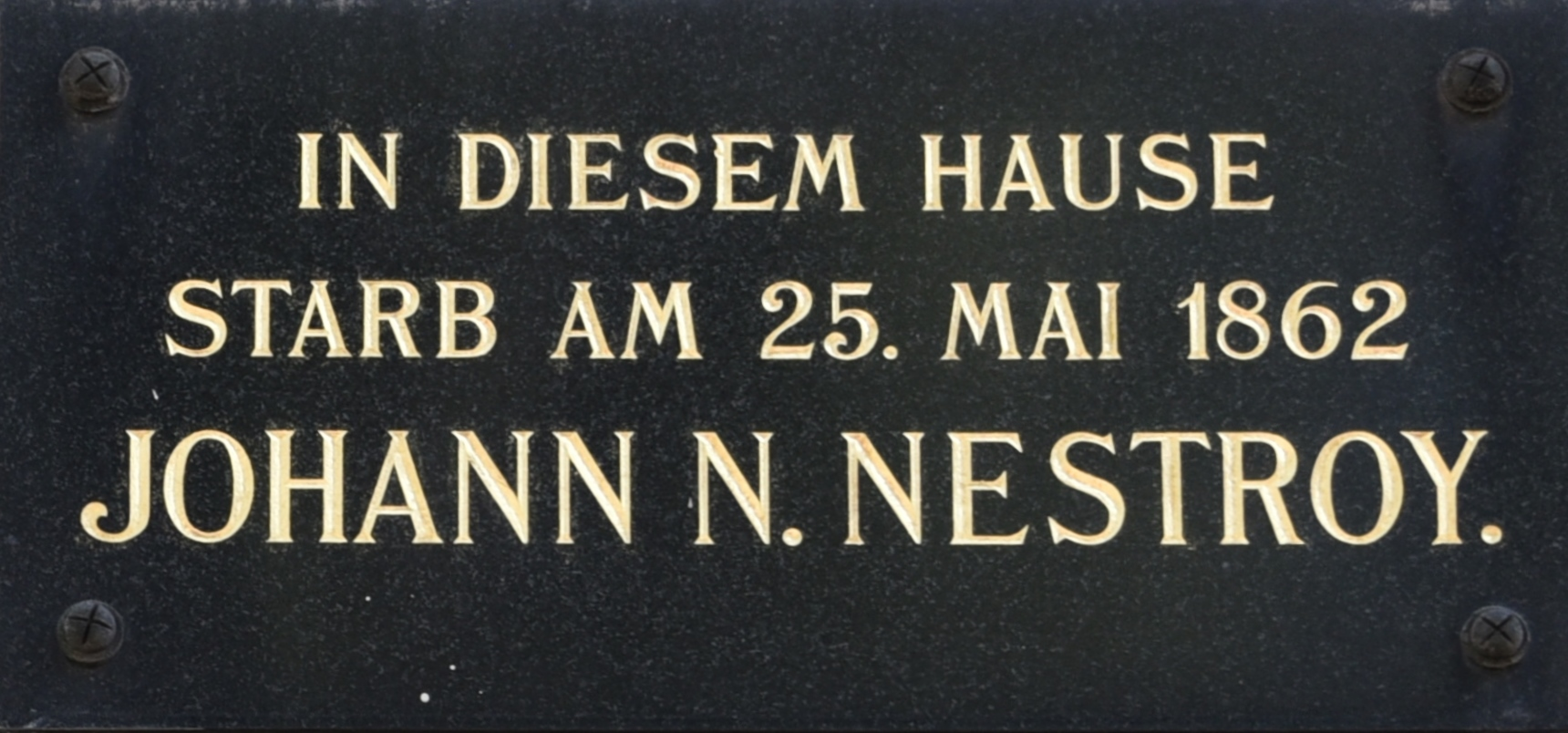 Gedenktafel Wohnhaus Johann Nestroy, Graz